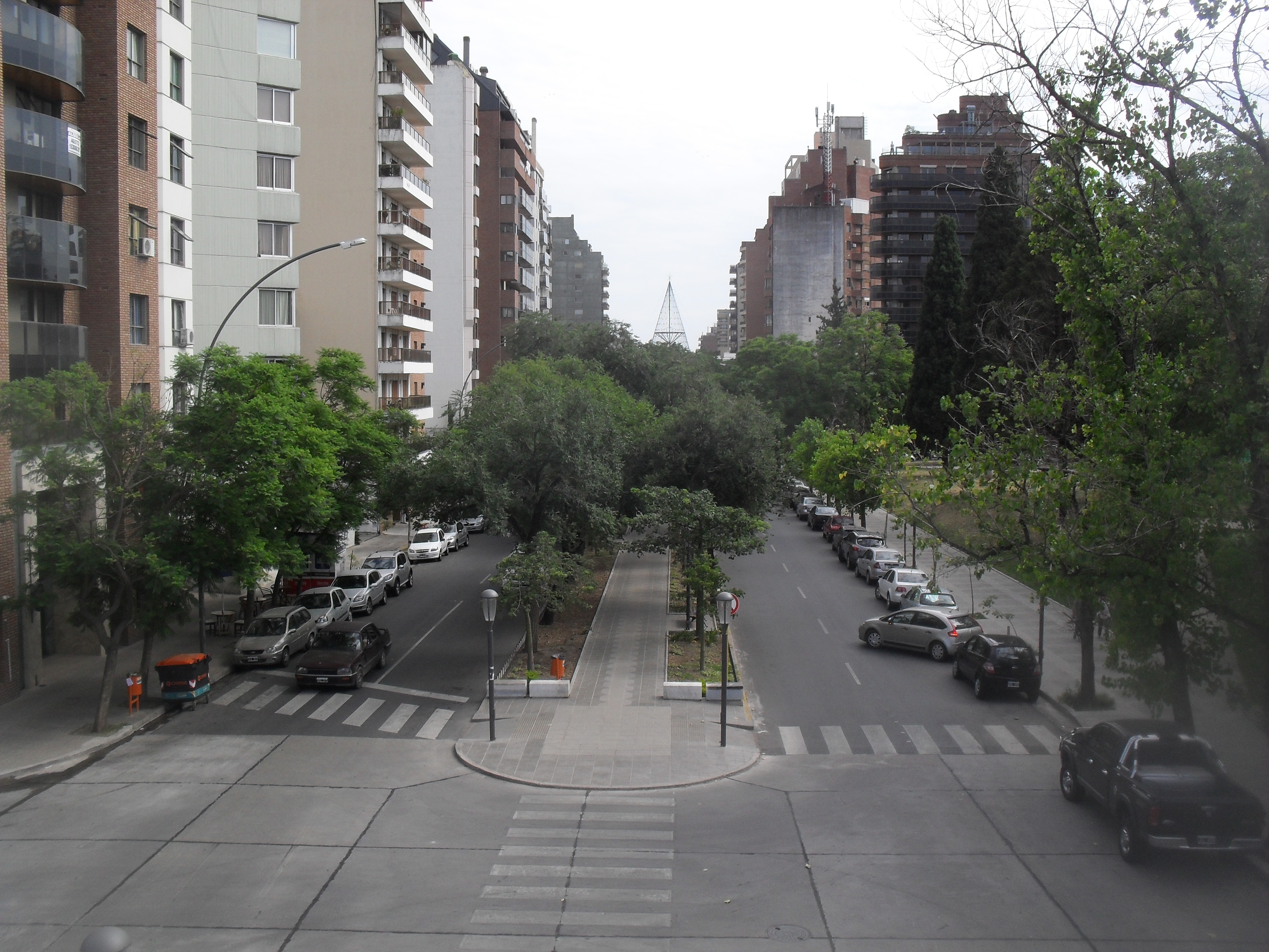 Vista de la avenida desde el nuevo puente del Parque Las Tejas